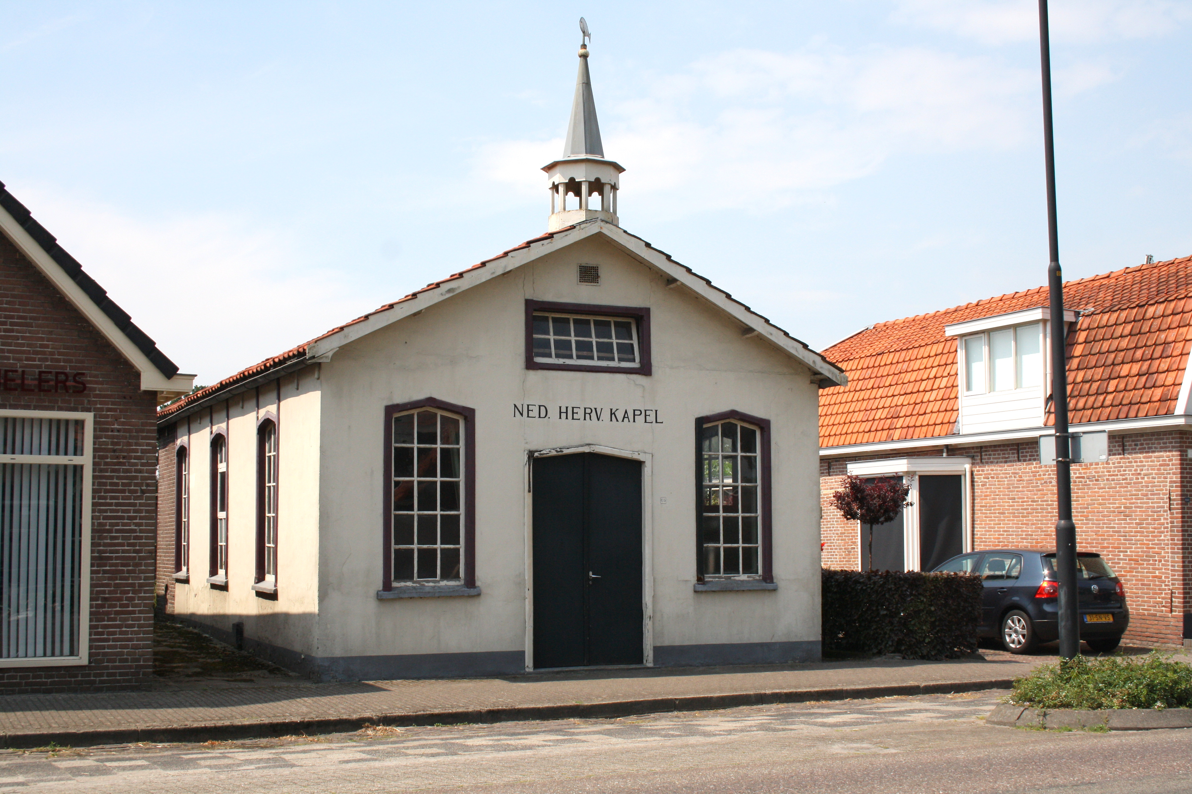 De Blesse - Weststellingewerf - Hervormde Evangelisatiekapel - Buiten gebruik